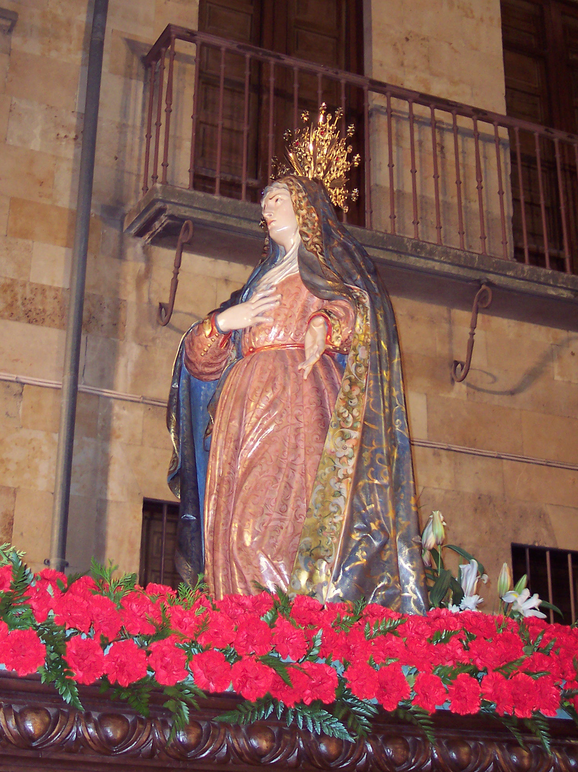 Ntra. Sra. Madre de la Sabiduria (Salamanca)